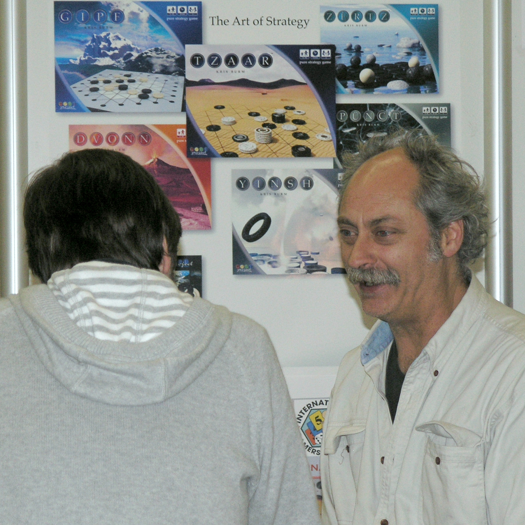 Internationalen Spieltage SPIEL 2008